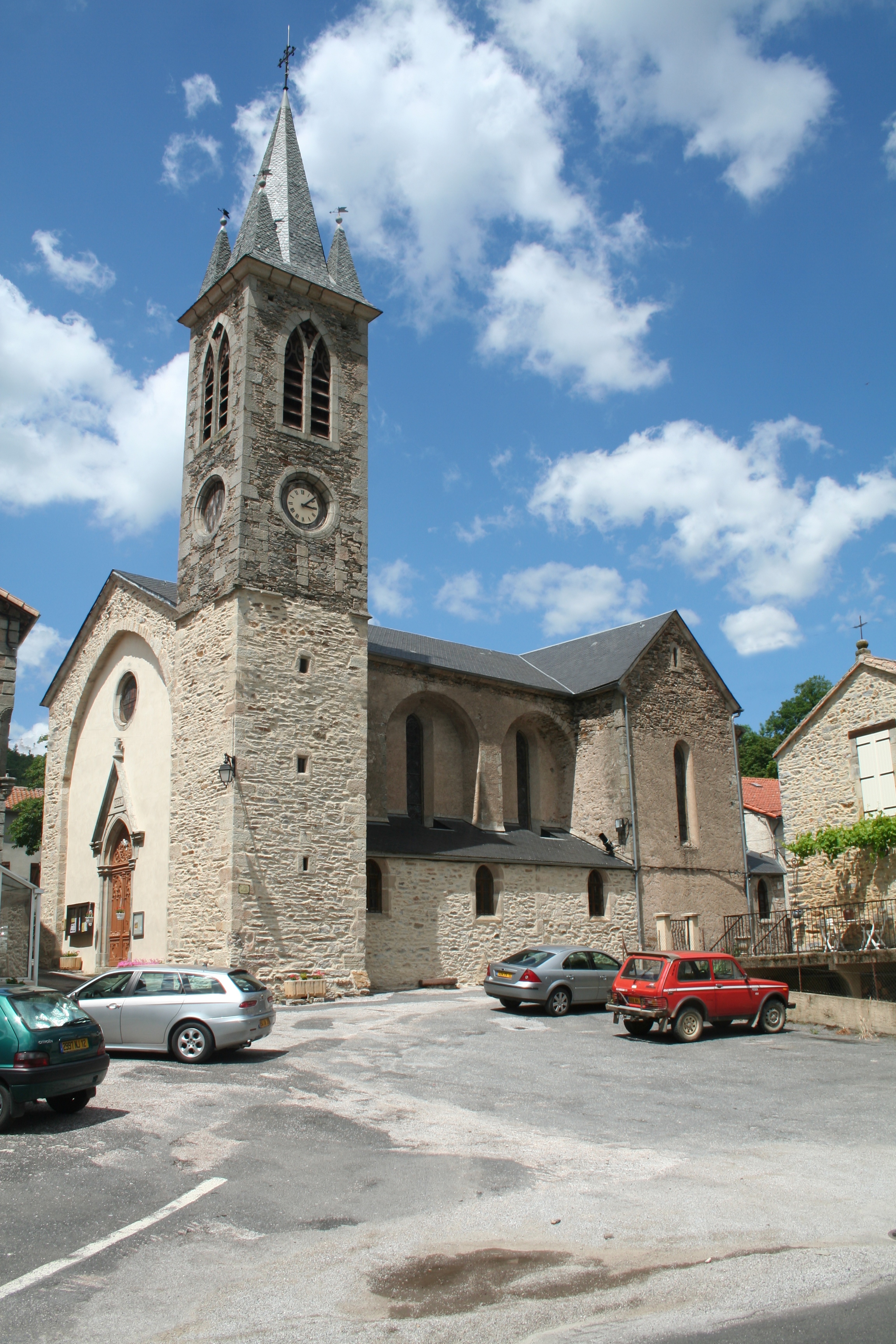 Fayet (Aveyron) - église de Laroque.